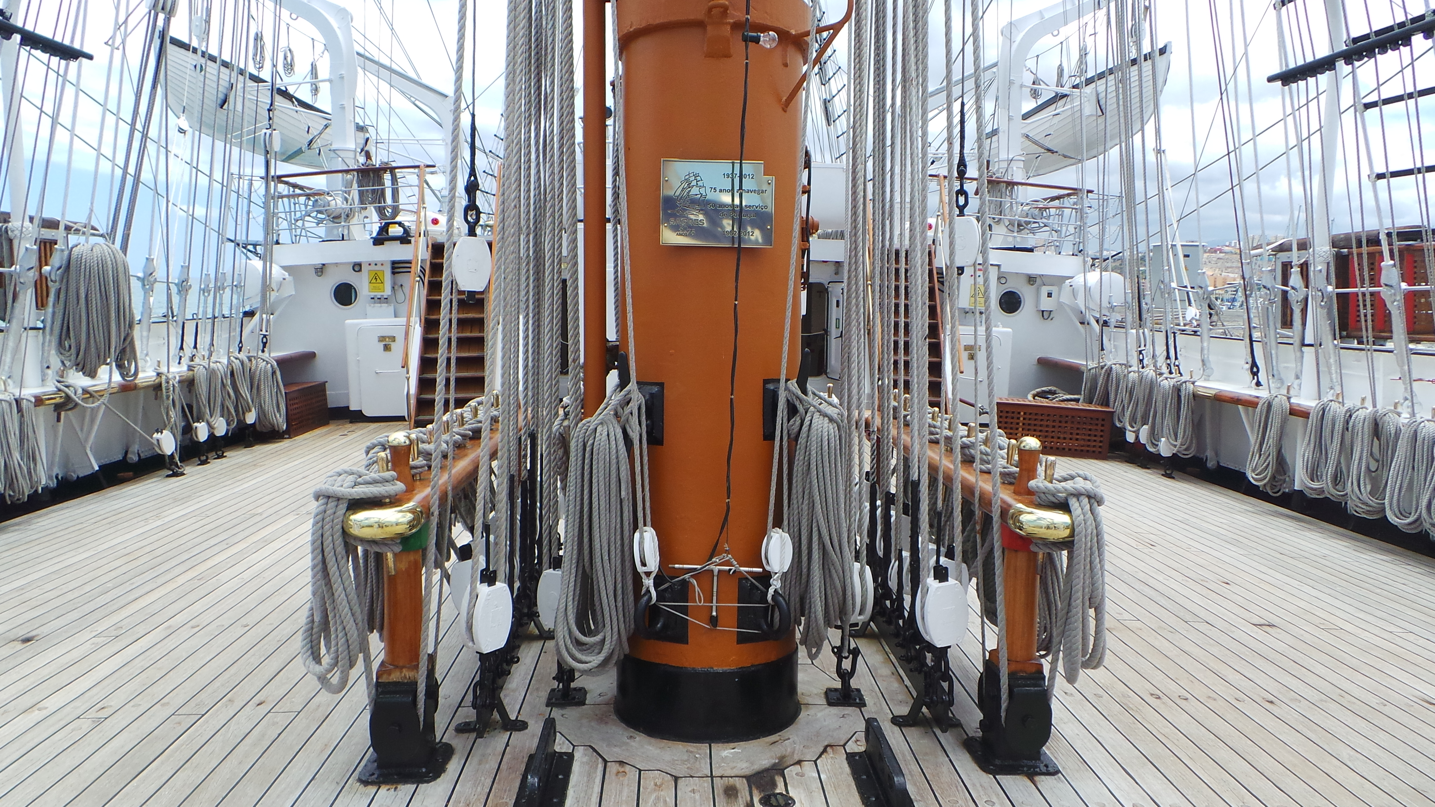 Visita al Buque Escuela NRP Sagres, en La Base Naval de Las Palmas de Gran Canaria. Este fin de semana de semana ( 20, 21 y 22 de junio de 2014) tenemos la oportunidad de disfrutar, en Las Palmas de Gran Canaria, de la visita del buque escuela portugués NRP Sagres, se encuentra atracado en el muelle de la base naval y podrá ser visitado hoy viernes hasta las 19h y mañana sábado de 10 a 12h y de 14 a 19h . El Buque proveniente de Lisboa partirá el domingo hasta Las Azores , para luego regresar a Lisboa, cuenta con unos 60 guardiamarines, con una decena de mujeres entre ellos, que realizan su periodo de instruccion Construido en 1937 en Hamburgo y tras varios avatares, fue adquirido en 1961 por la marina Portuguesa para sustituir al Sagres II, entrando en servicio como Sagres III en febrero de 1962. Tiene 89,5 metros de eslora, 12 de manga y 5,5 de calado, siendo su altura máxima de 45,5 metros. Cuenta además con 1.971 metros cuadrados de vela y desplaza 1.893 toneladas. La figura del mascarón de proa del Sagres III es el Infante D. Henrique nacido el 4 de marzo de 1394, siendo uno de los impulsores de la expansión y descubrimientos portugueses de la época. Más información del Buque : Web del Buque